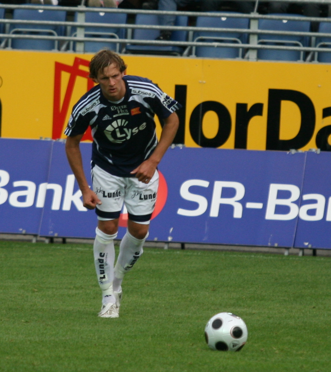 Alexander Ødegaard, på Viking stadion 24. august 2008